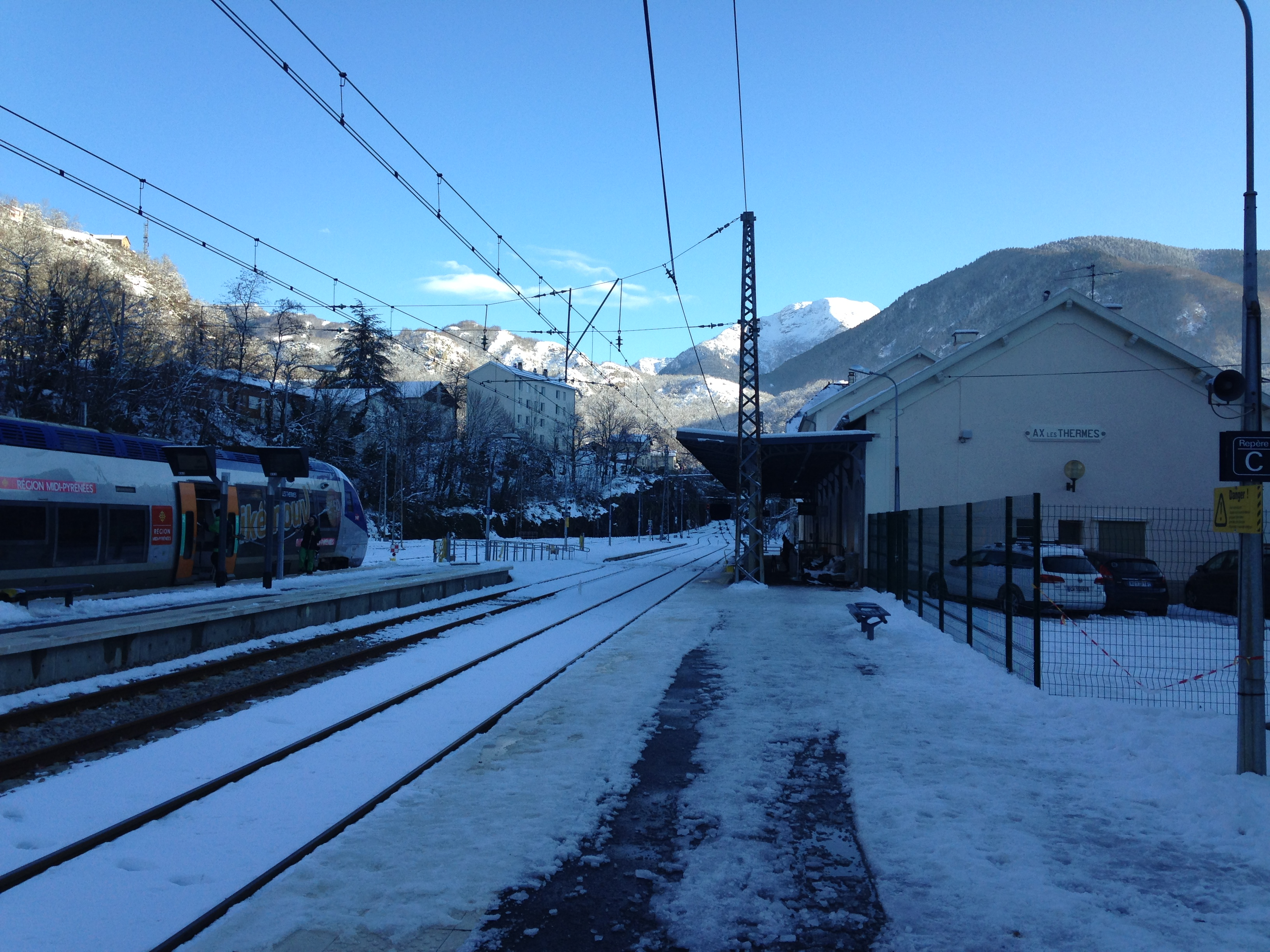 Gare SNCF d'Ax-les-Thermes